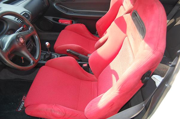 type r